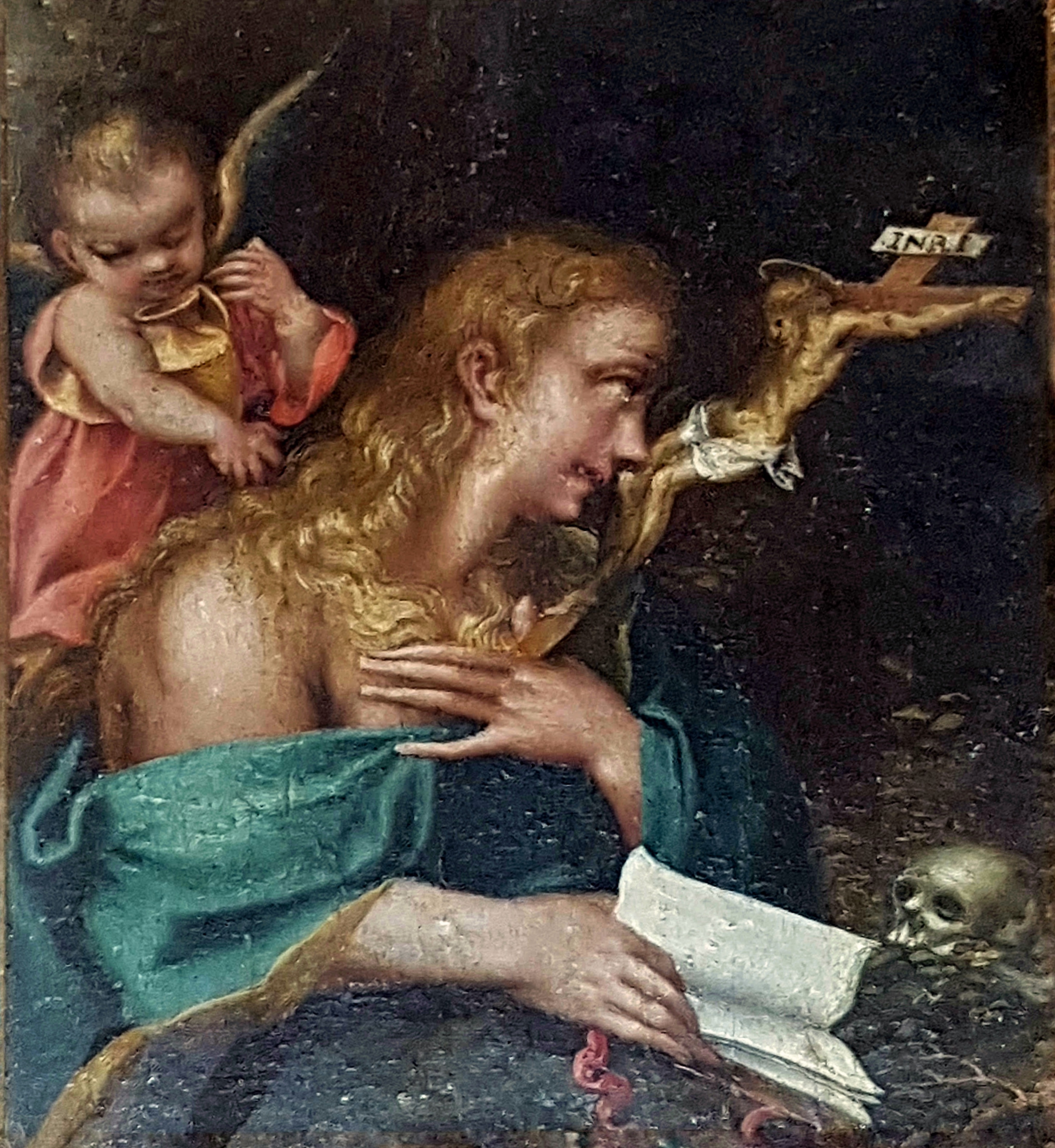 Maddalena in preghiera